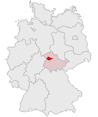 Unstrut-Hainich-Kreis, Thuringia, Germany